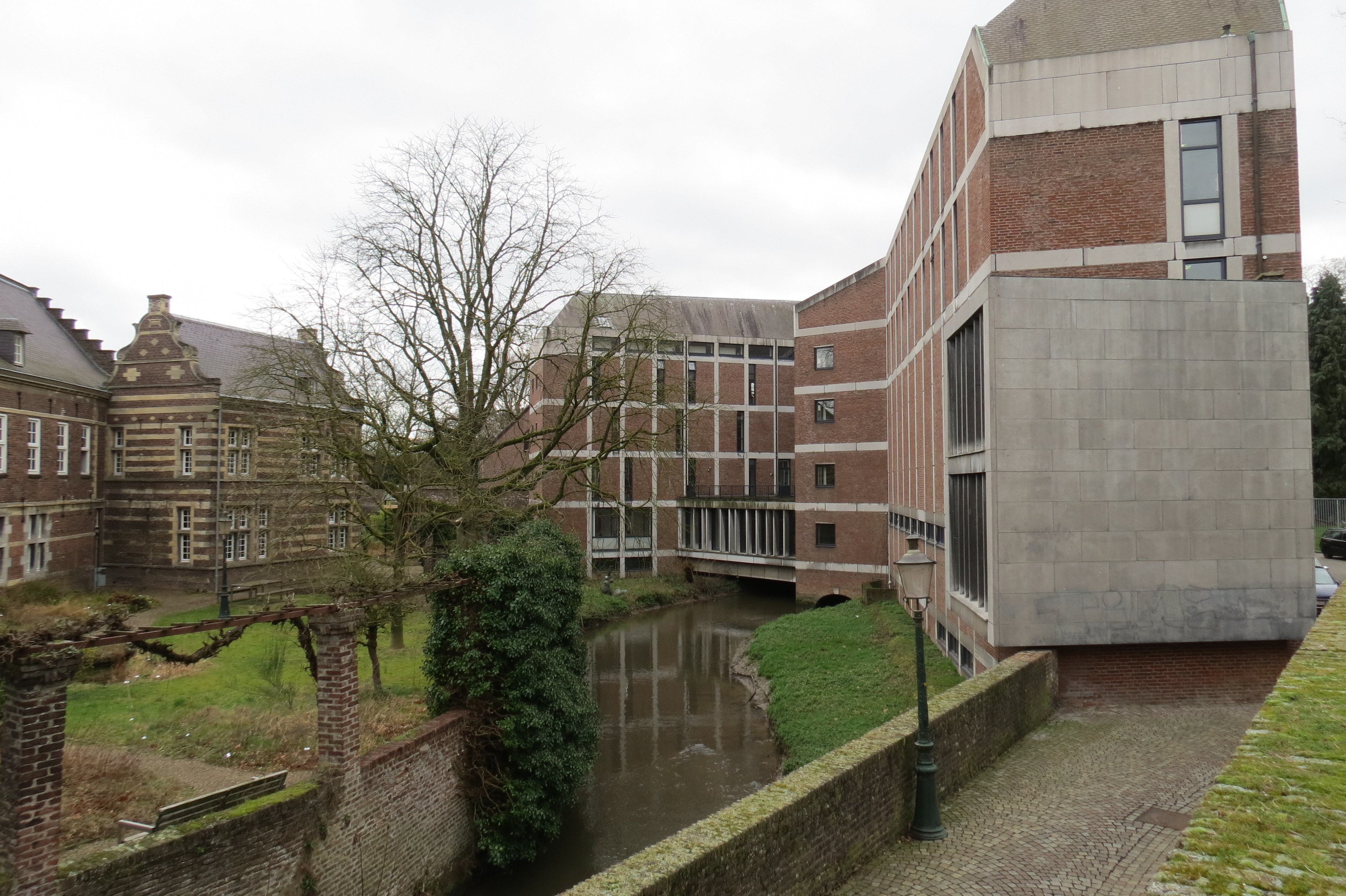 Duidelijk is de scheiding te zien tussen het Conservatorium en het Grauwzustersklooster met daar tussen het riviertje de Jeker. Zicht zuidoost